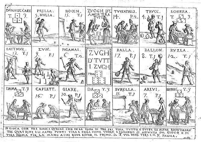 Zugh d' tutt i zugh (gioco di tutti i giochi) e firmata in basso a destra MI. FE. L'opera ritrae 21 riquadri, disposti su tre righe, 20 dei quali raffigurano un gioco tradizionale. Dal primo riquadro in alto a sinistra, procedendo verso destra, si elencano i giochi: gioco delle carte, trottola (prilla), bocce, "gioco dell'amore tira tutto" (non identificato), tric-trac (tuccatigli), trucco a terra (trucc), mulino (schiera), battimuro, birilli (zun), pallamaglio (palamai), pallacorda (balla), pallone col bracciale (ballon), ruzzola (ruzla), dama, cappelletto, lippa (giare), dado (da), borella (burella), ? (non identificato), biribissi. Secondo Gioacchino Priscoglio:2001 i giochi non identificati corrisponderebbero a: biglie, filetto, morra, ruota della fortuna.